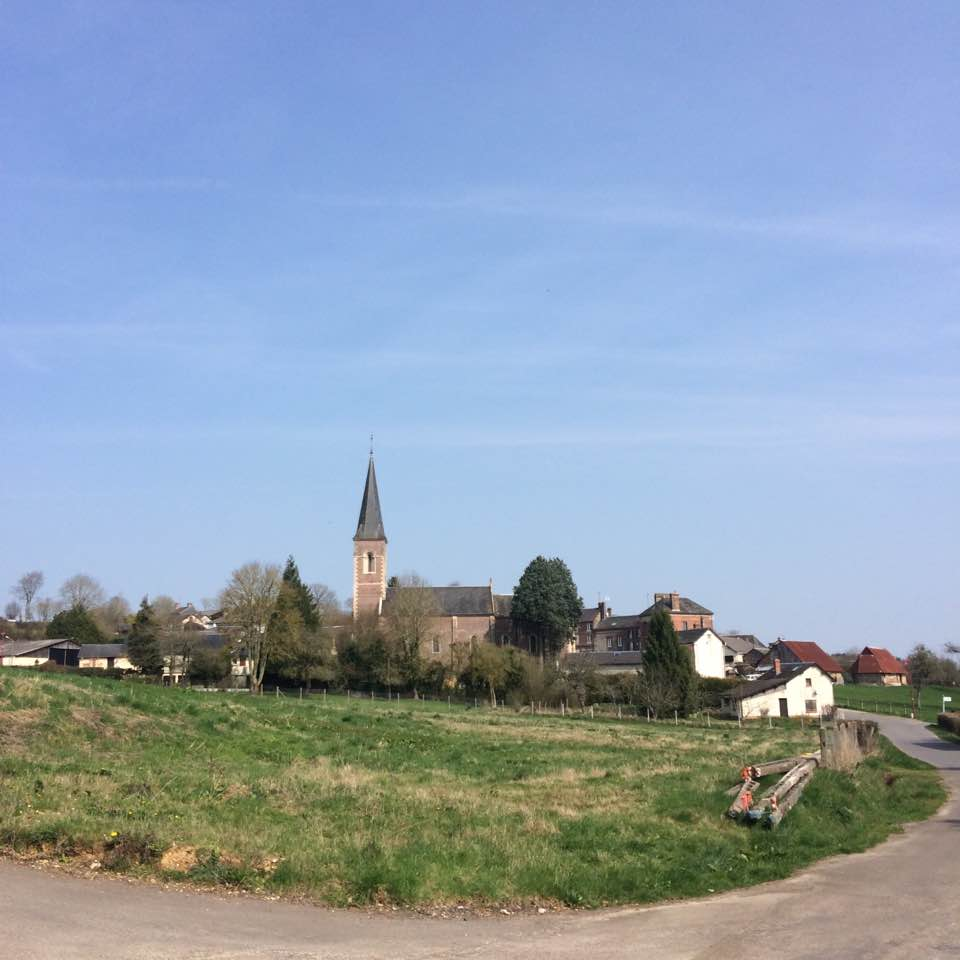 Centre-bourg d'Heugon (Orne).